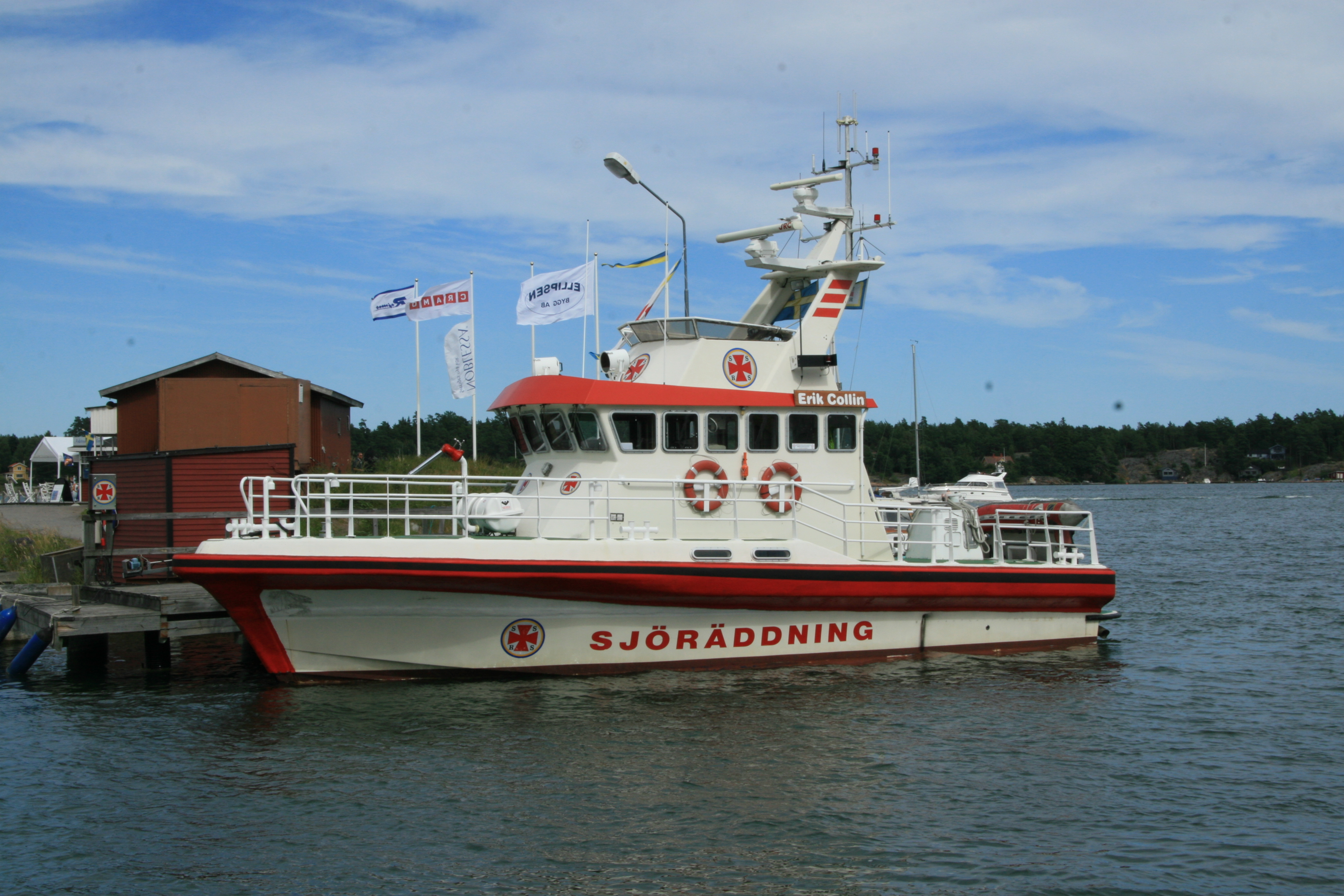 Rescue Erik Collin, Sjöräddningssällskapet, SSRS i Arkösund 21 juli 2007